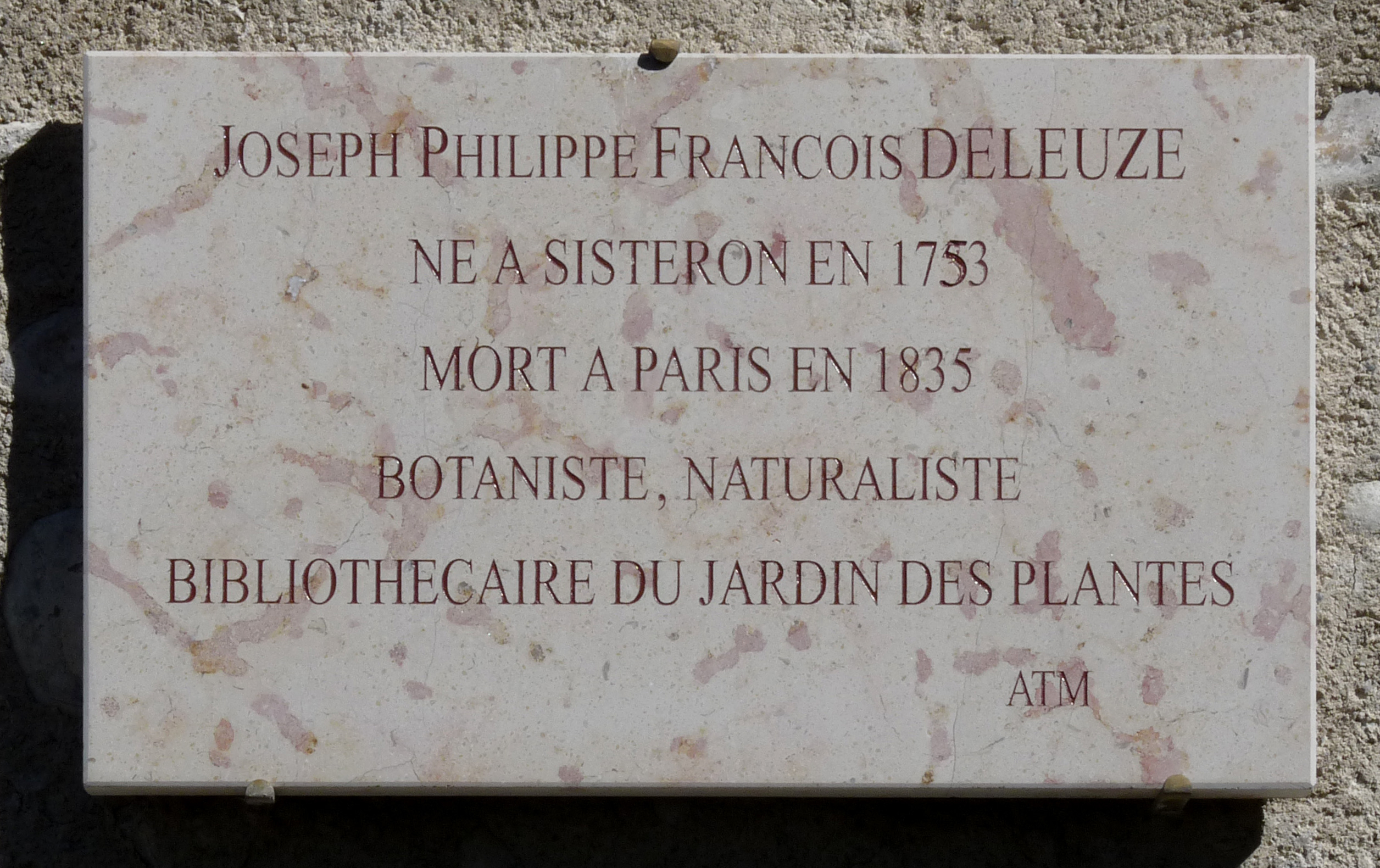 Plaque dédiée au botaniste et naturaliste Joseph Philippe François Deleuze, rue Deleuze à Sisteron